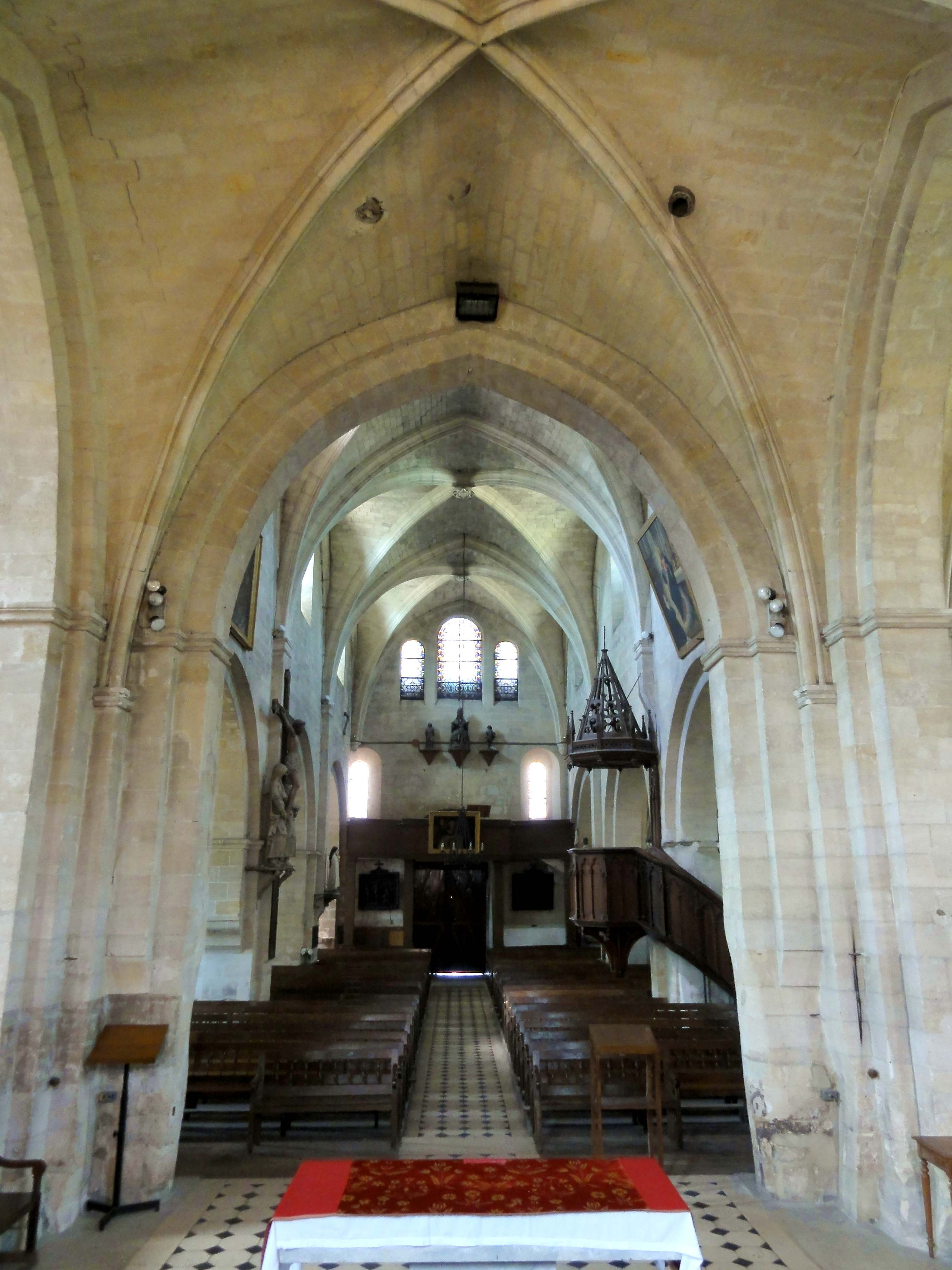 Intérieur de l'église (voir titre).